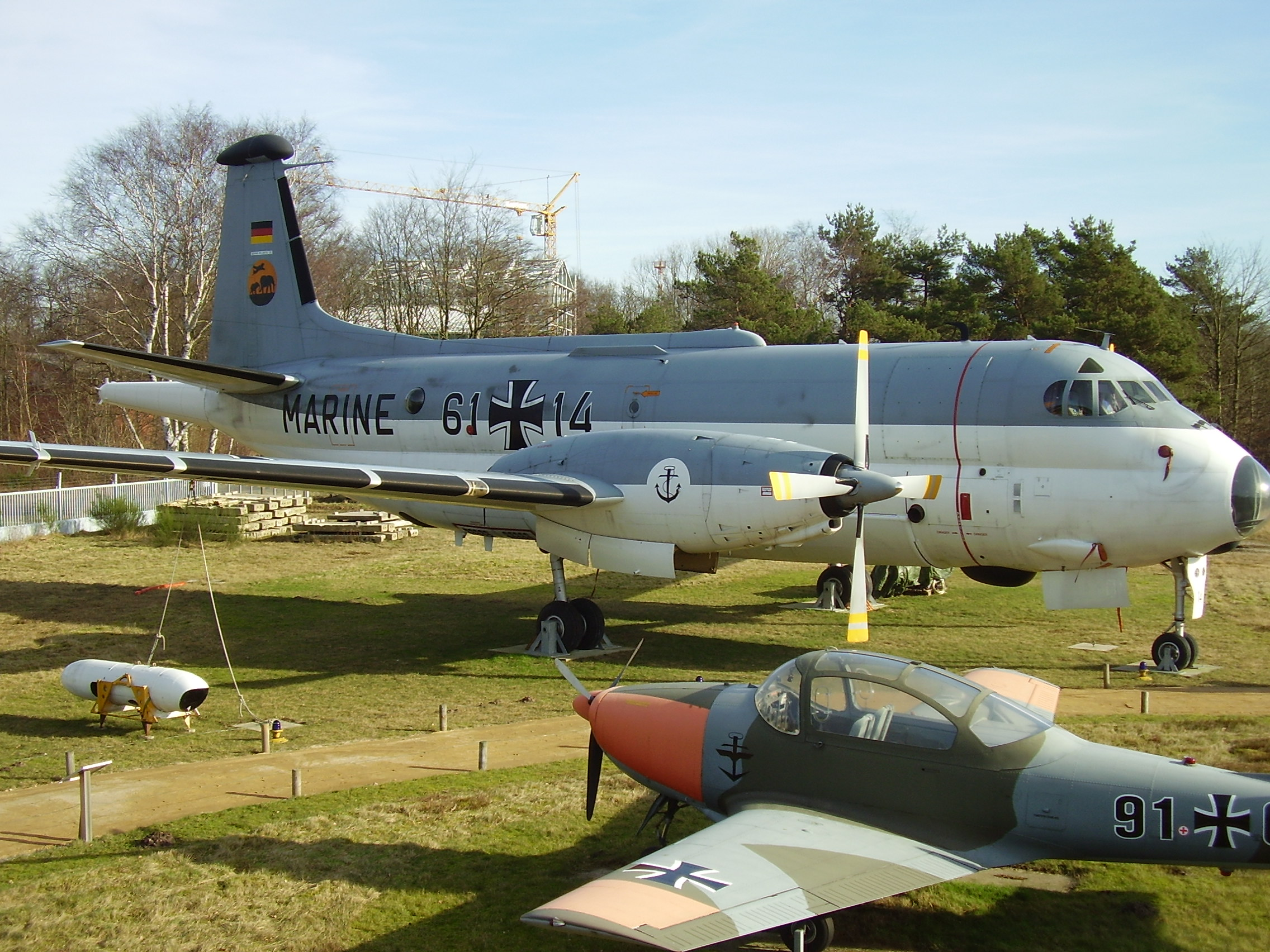 Aeronauticum in Nordholz, Luftschiffe, Zeppelin, bei Cuxhaven, Luftfahrtmuseum